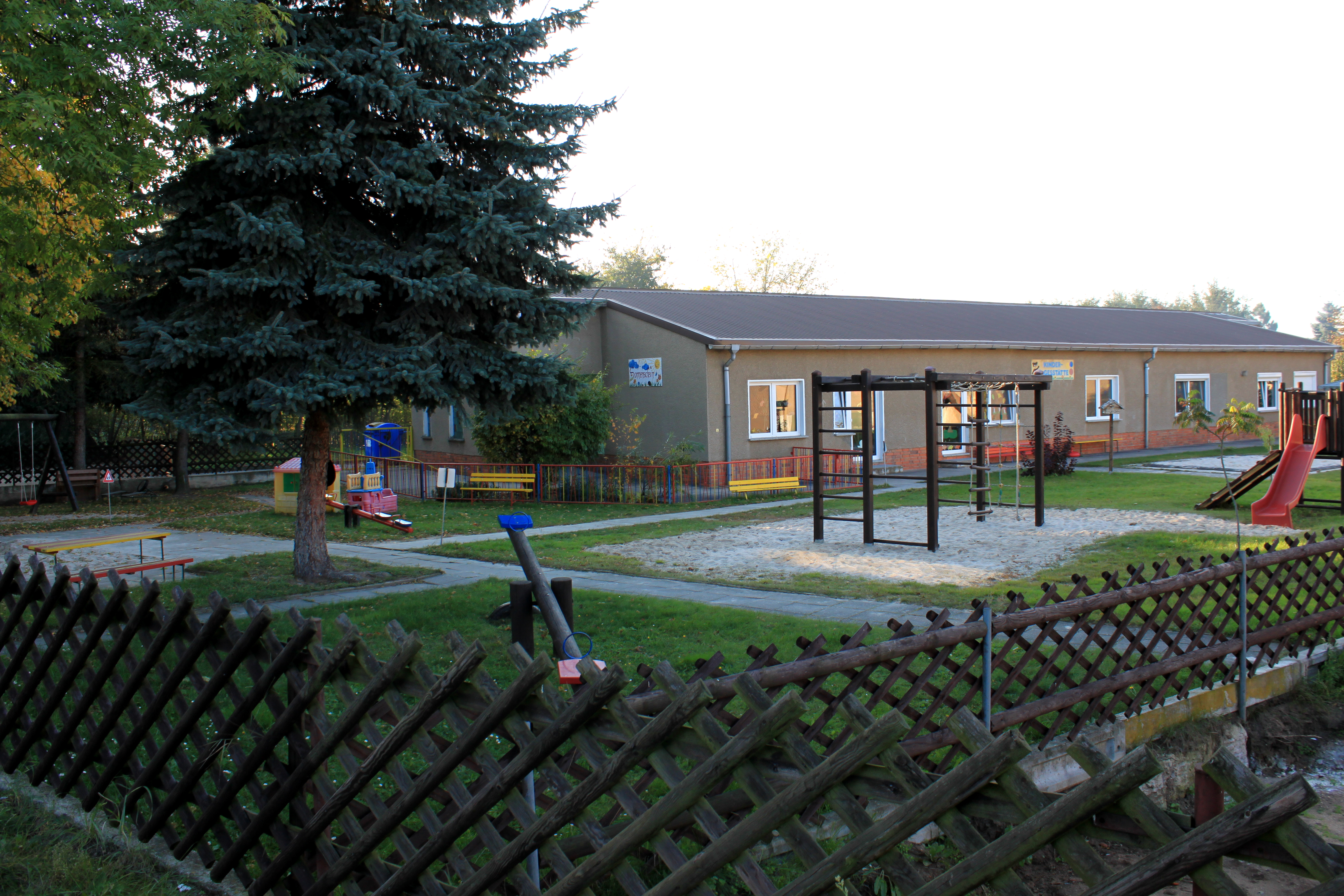 Haida